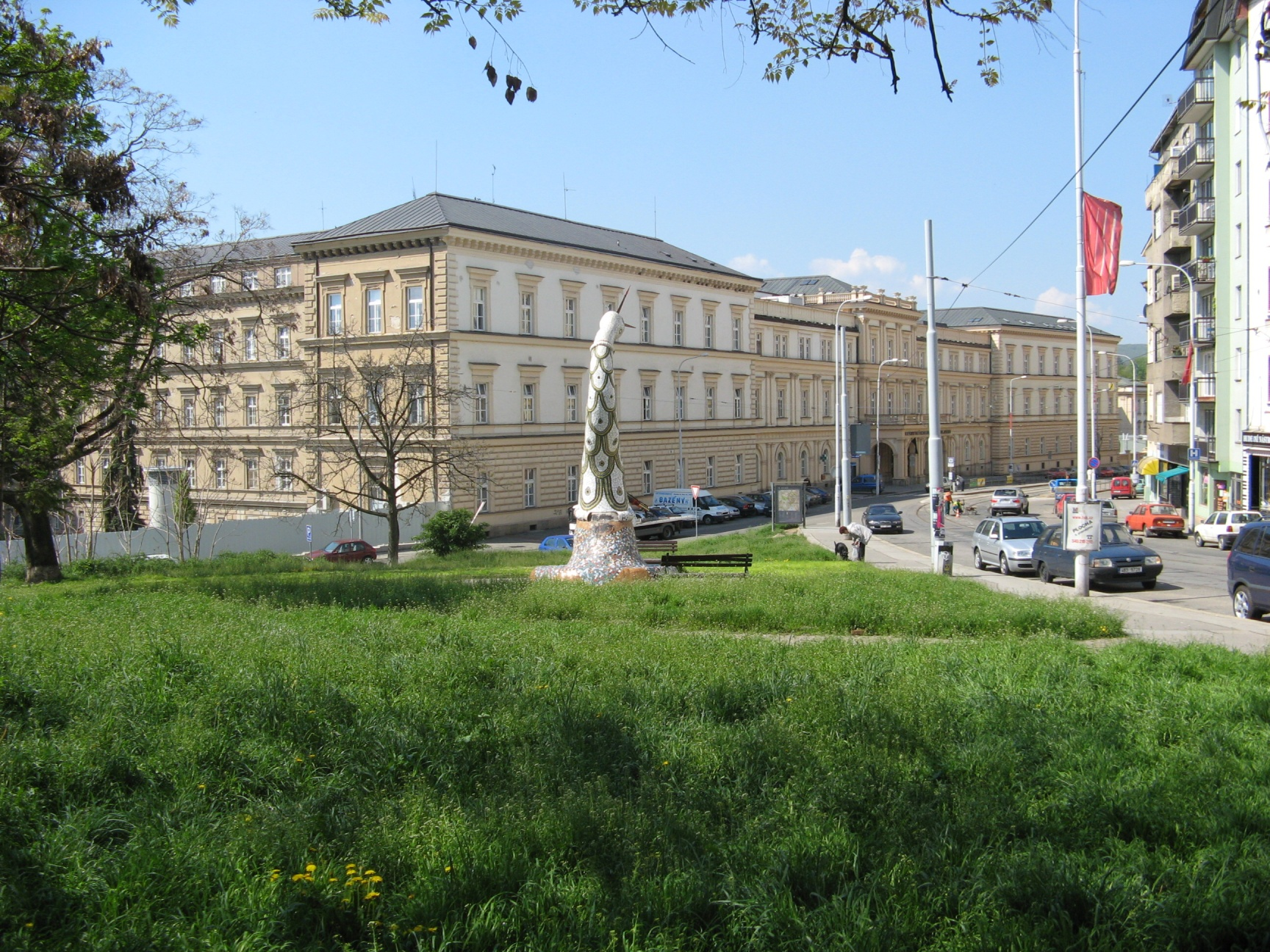 Fakultní nemocnice U svaté Anny, pohled z Pekařské ulice (Brno Střed)